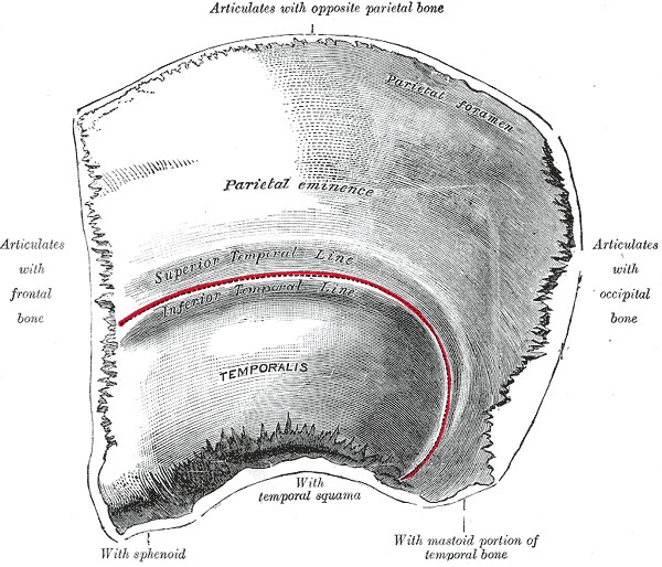 Left parietal bone. Outer surface.